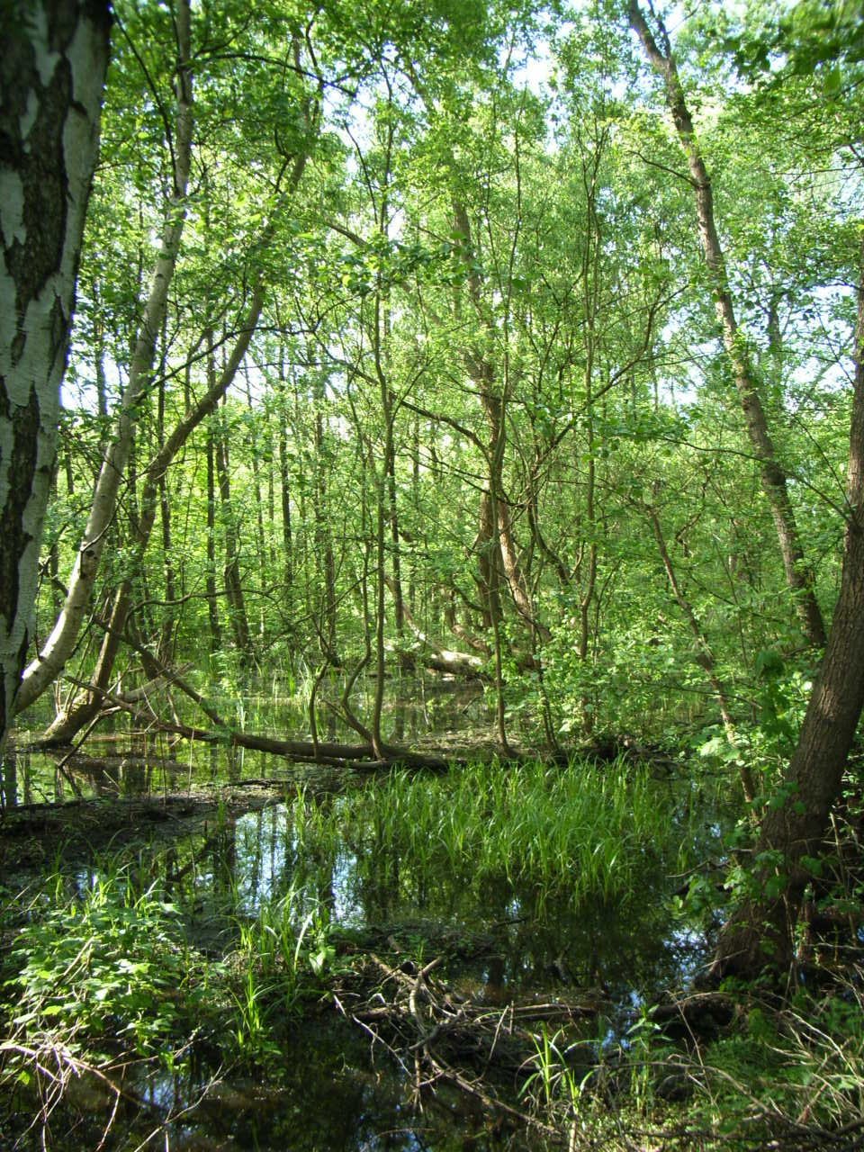 Biotop über dem Erdfall des Salzstocks Langenfelde-Othmarschen in Hamburg-Groß Flottbek